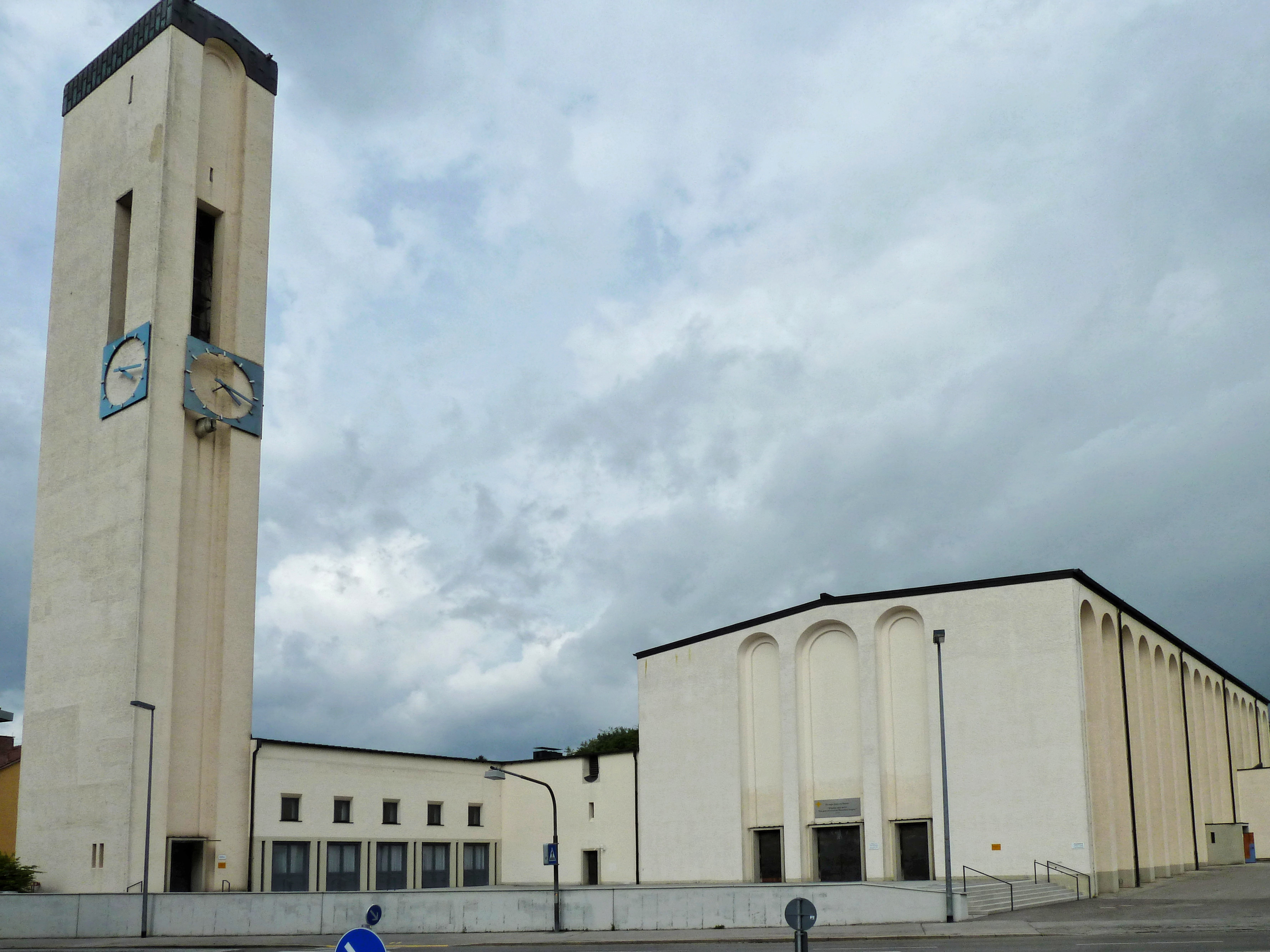 Neugablonz herz jesu von süden